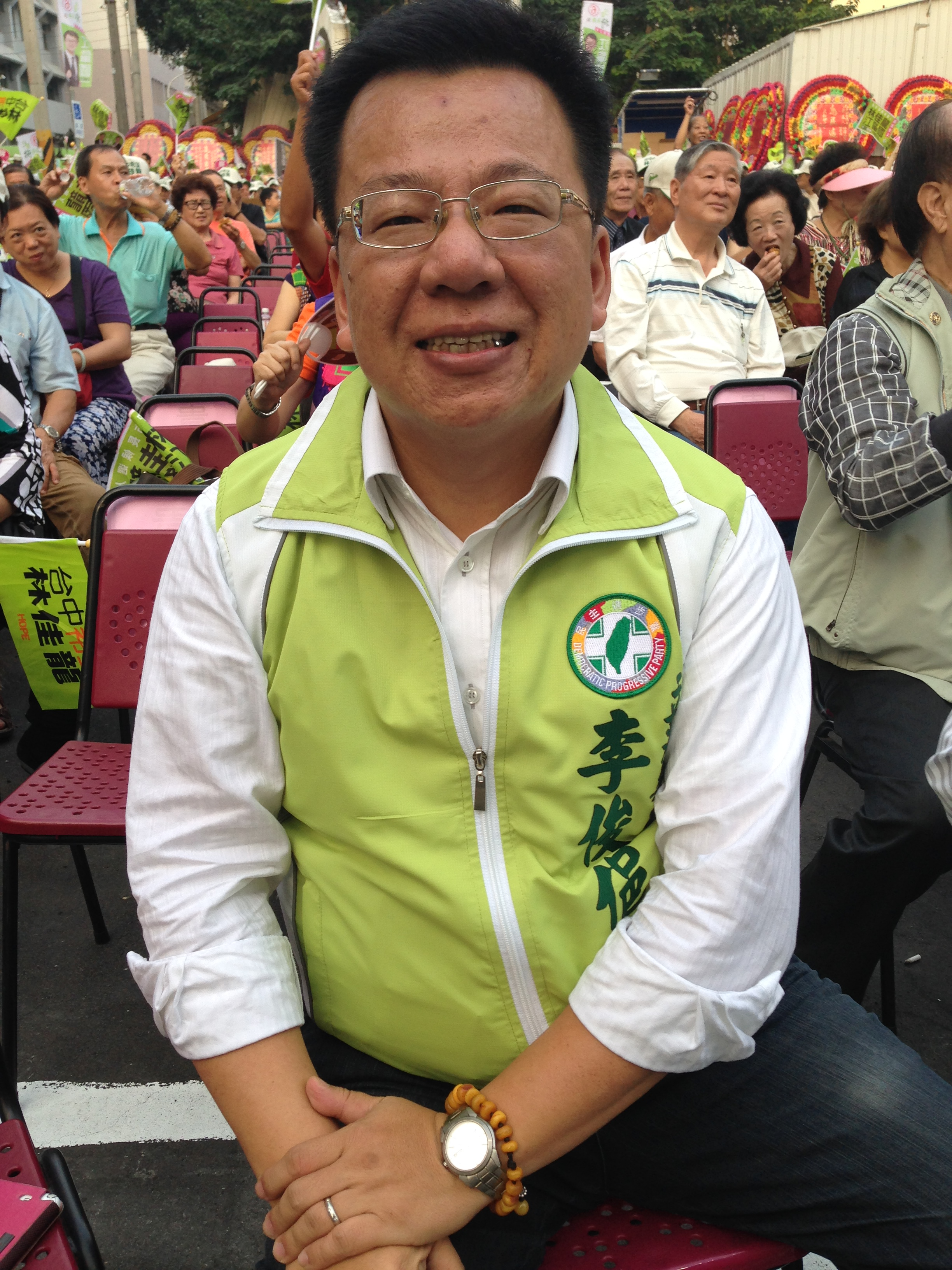 李俊俋